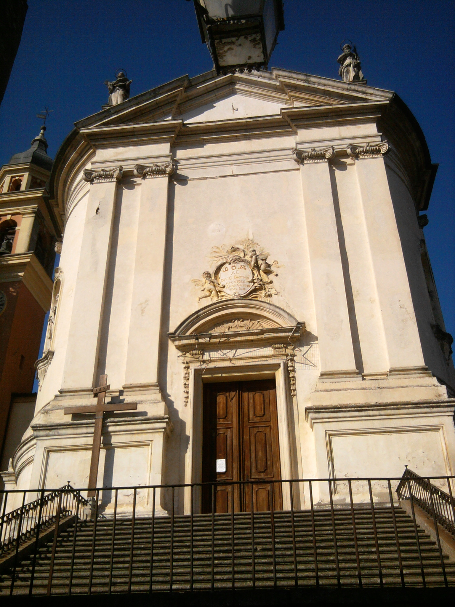 Valnogaredo, frazione di Cinto Euganeo: chiesa di San Bartolomeo.